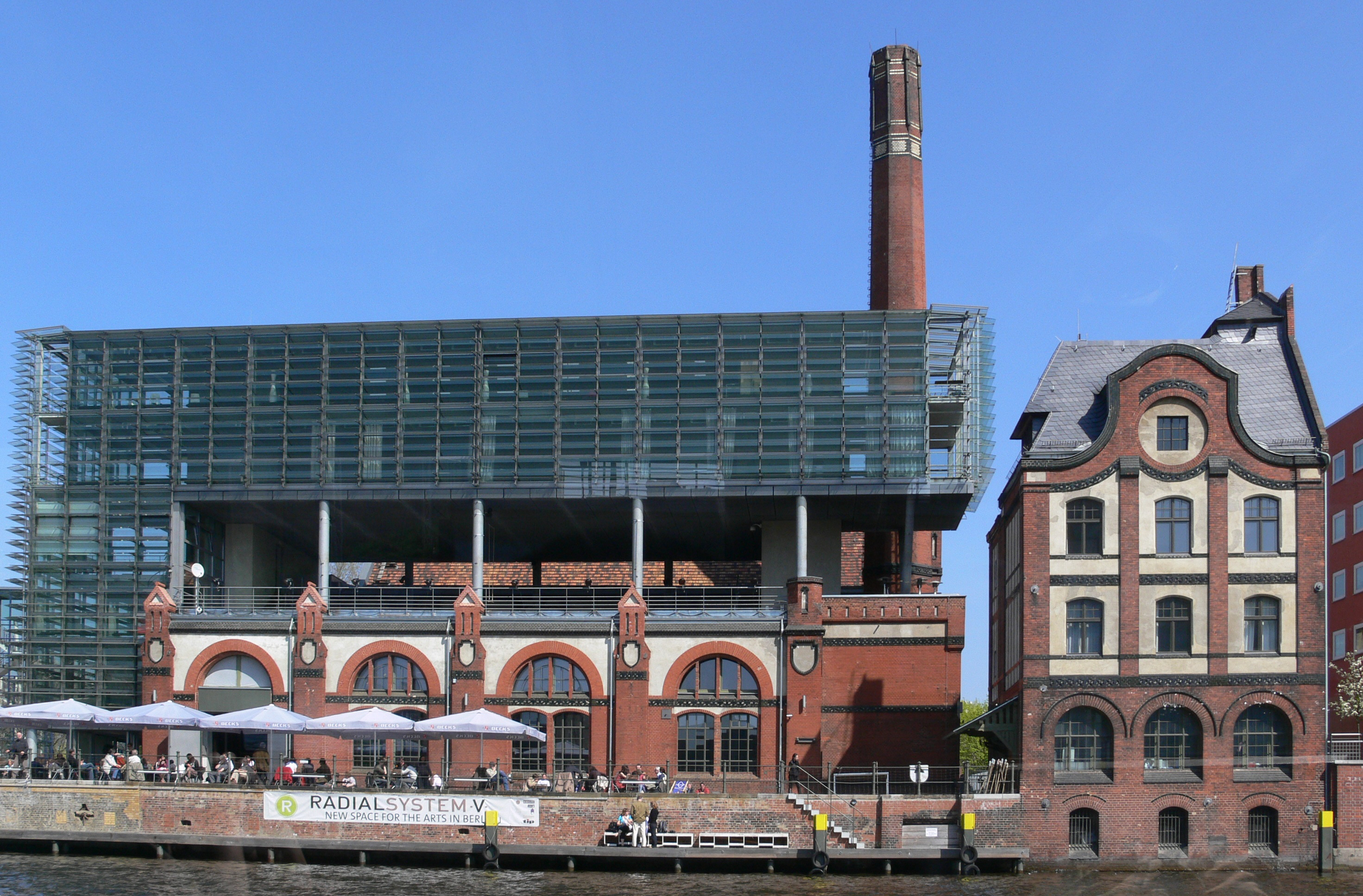 Radialsystem V, Berlin-Friedrichshain